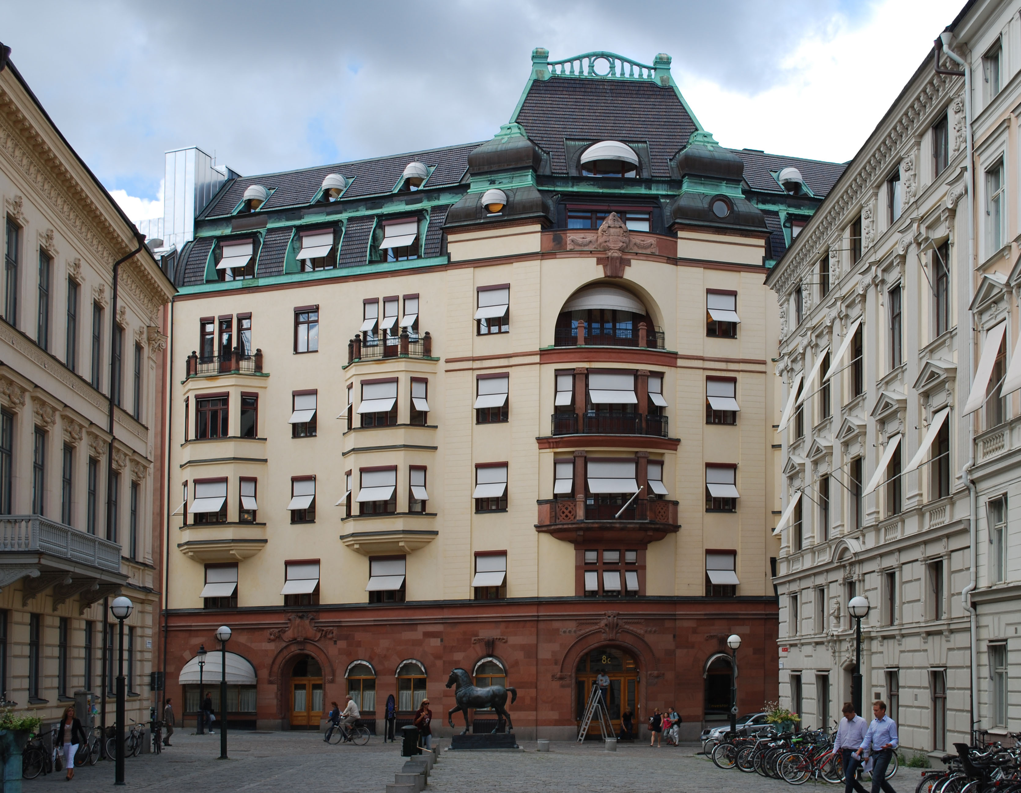 Arsenalsgatan 8. Byggt 1907-1909.